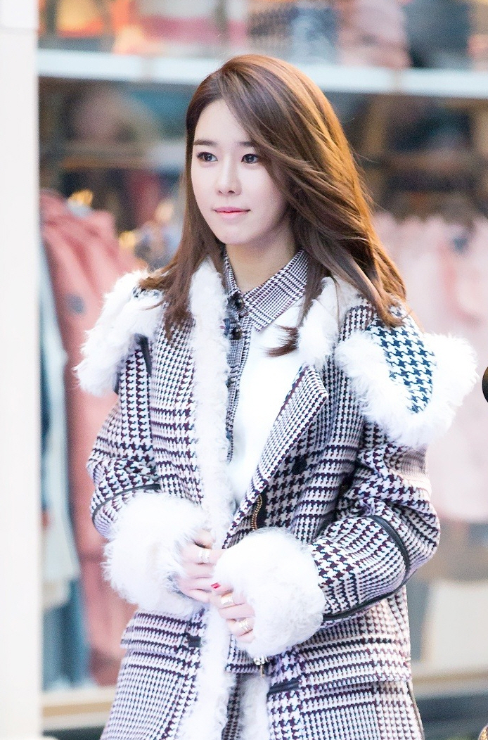 140123-타미힐-피거-플래그쉽-스토어유인나